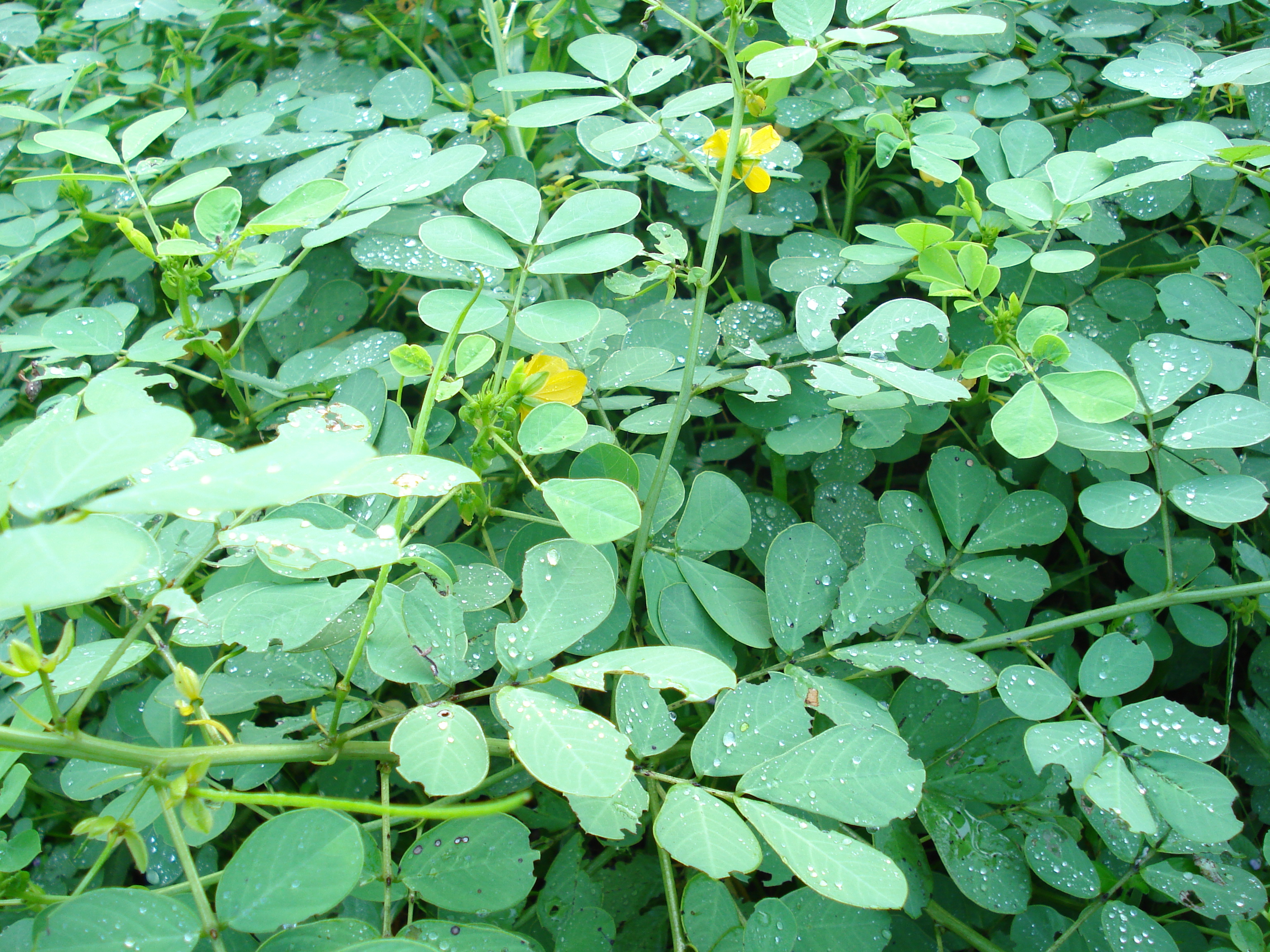 ഒരു ഔഷധ സസ്യമാണ്